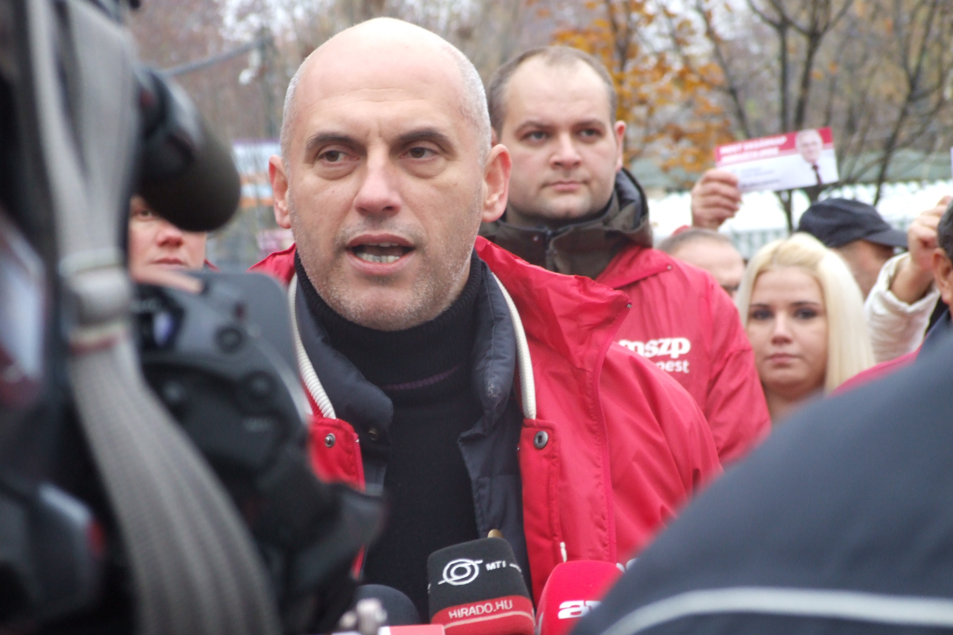 Tóbiás József, az MSZP elnöke a 2014-es újpesti időközi országgyűlési választás szocialista kampányeseményén